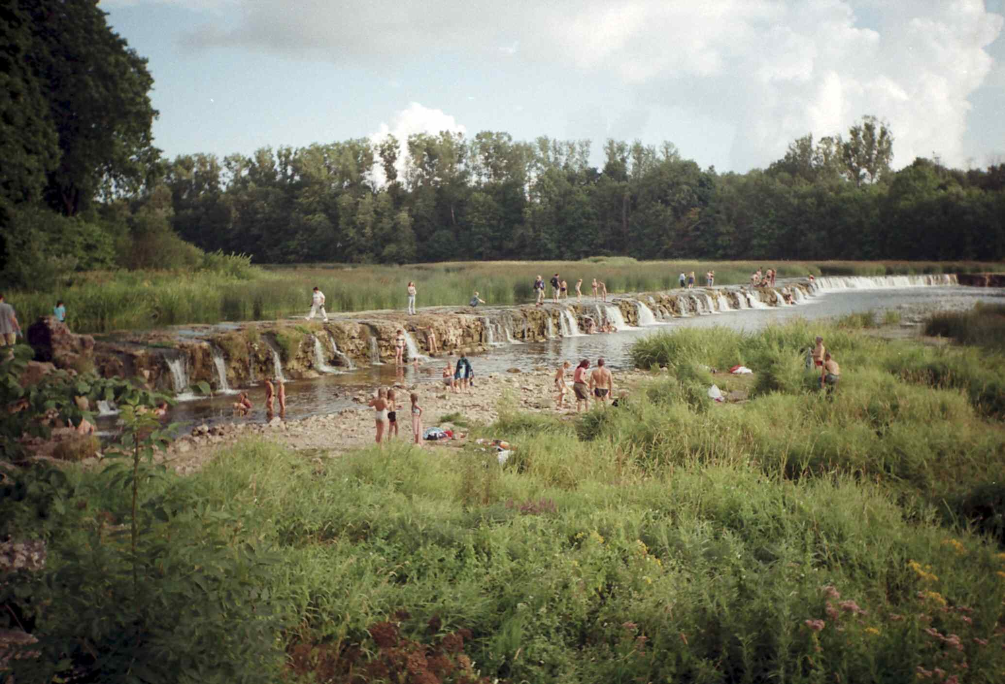 Kuldyga (seniau – Kuldinga; latviškai: Kuldīga, vokiškai: Goldingen) – miestas Latvijos vakaruose